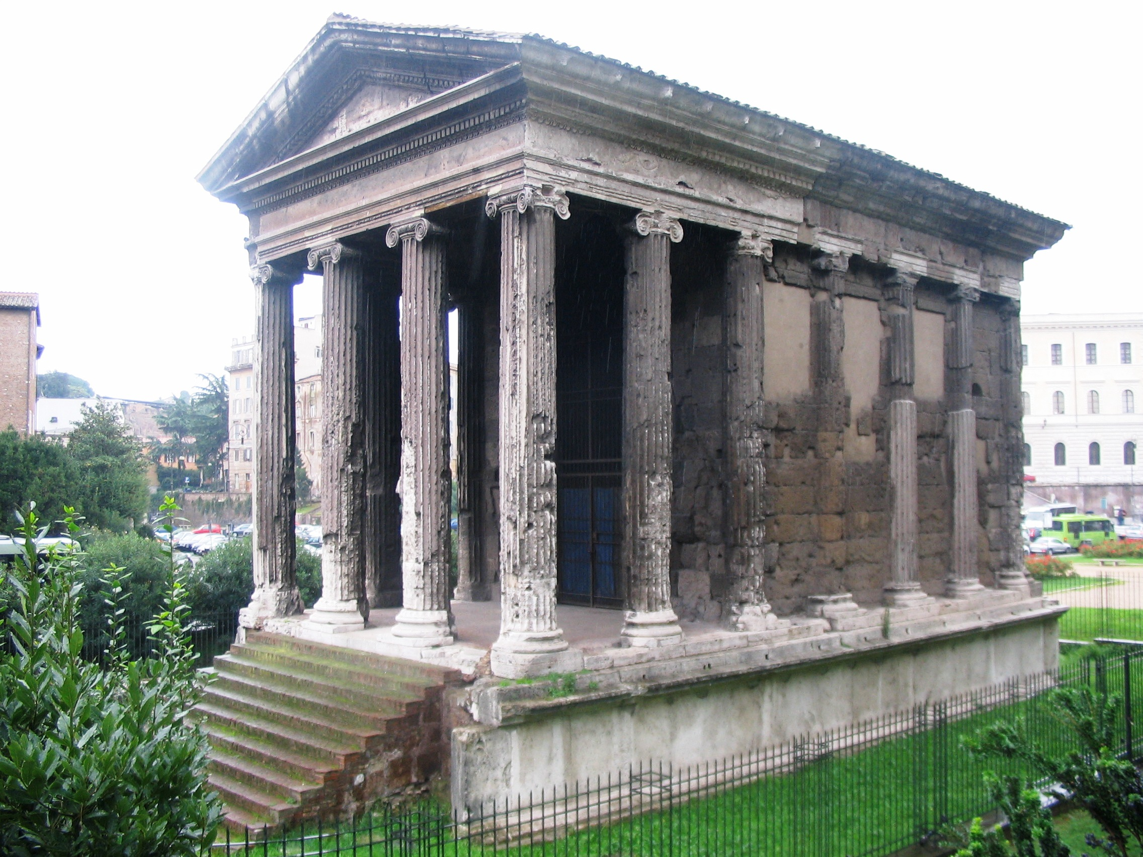 Roma, Tempio di Portunus.